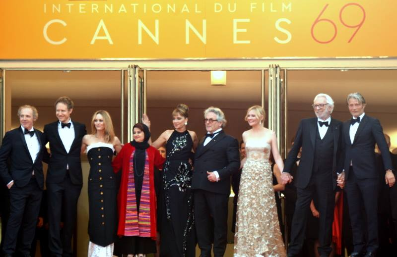 Le jury des long-métrages au festival de Cannes : de gauche à droite, Arnaud Desplechin, László Nemes, Vanessa Paradis, Katayoon Shahabi, Valeria Golino, George Miller, Kirsten Dunst, Donald Sutherland, Mads Mikkelsen.